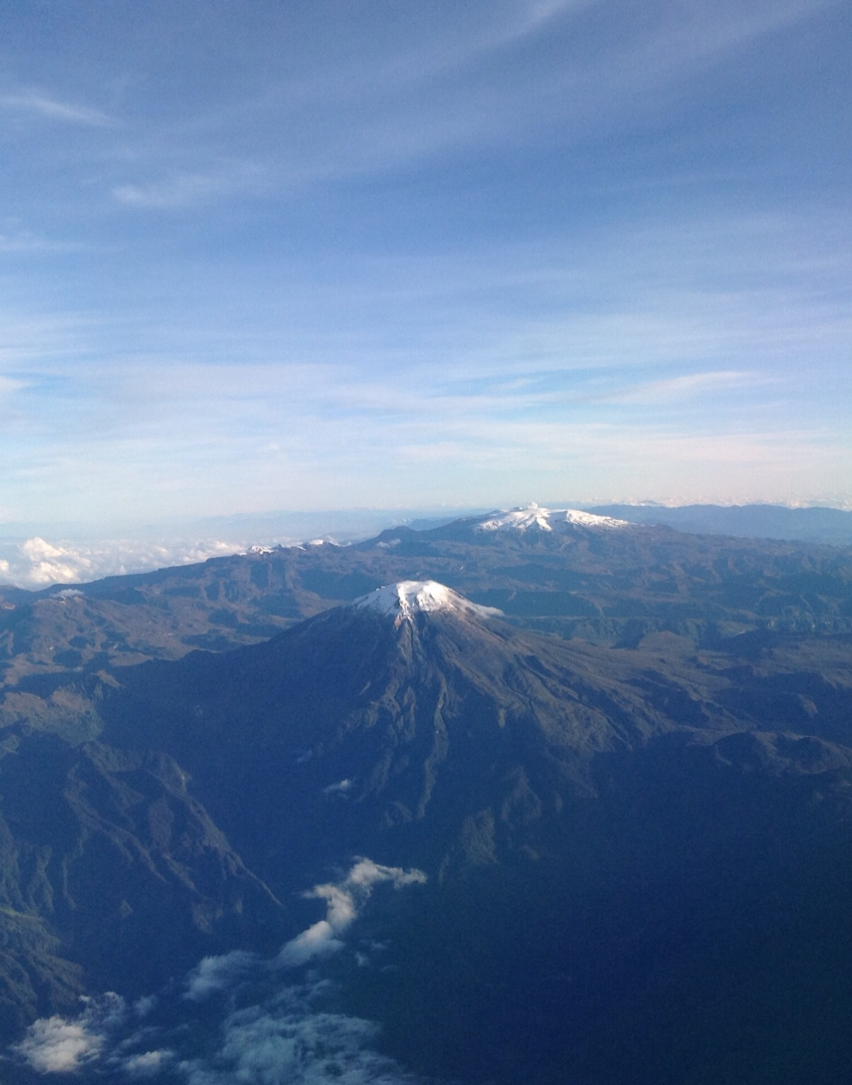 Toma aérea del Nevado del Tolima y al fondo el Nevado del Ruiz